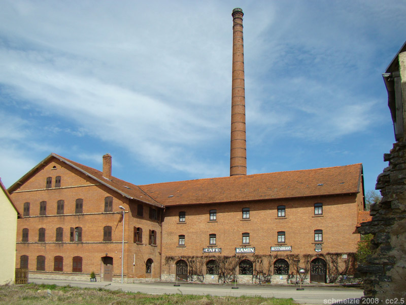 Ziegelei in Sinsheim-Reihen